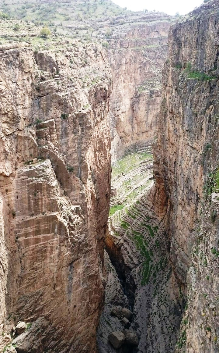 دره ویژدرون Vizhdarvan Valley